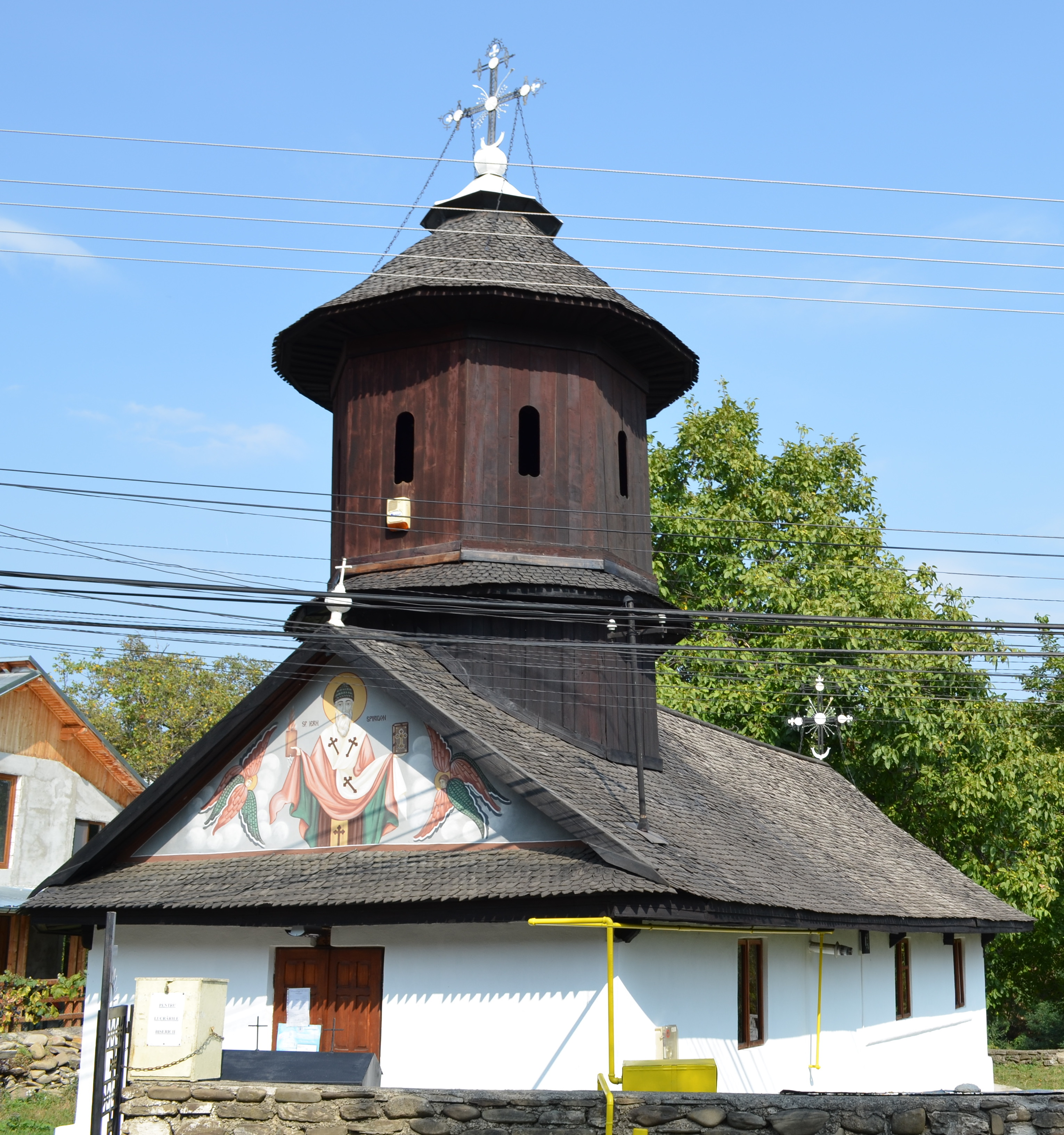 Biserica de lemn "Sf. Spiridon", Str. Berevoiești nr.52, Vălenii de Munte, Prahova